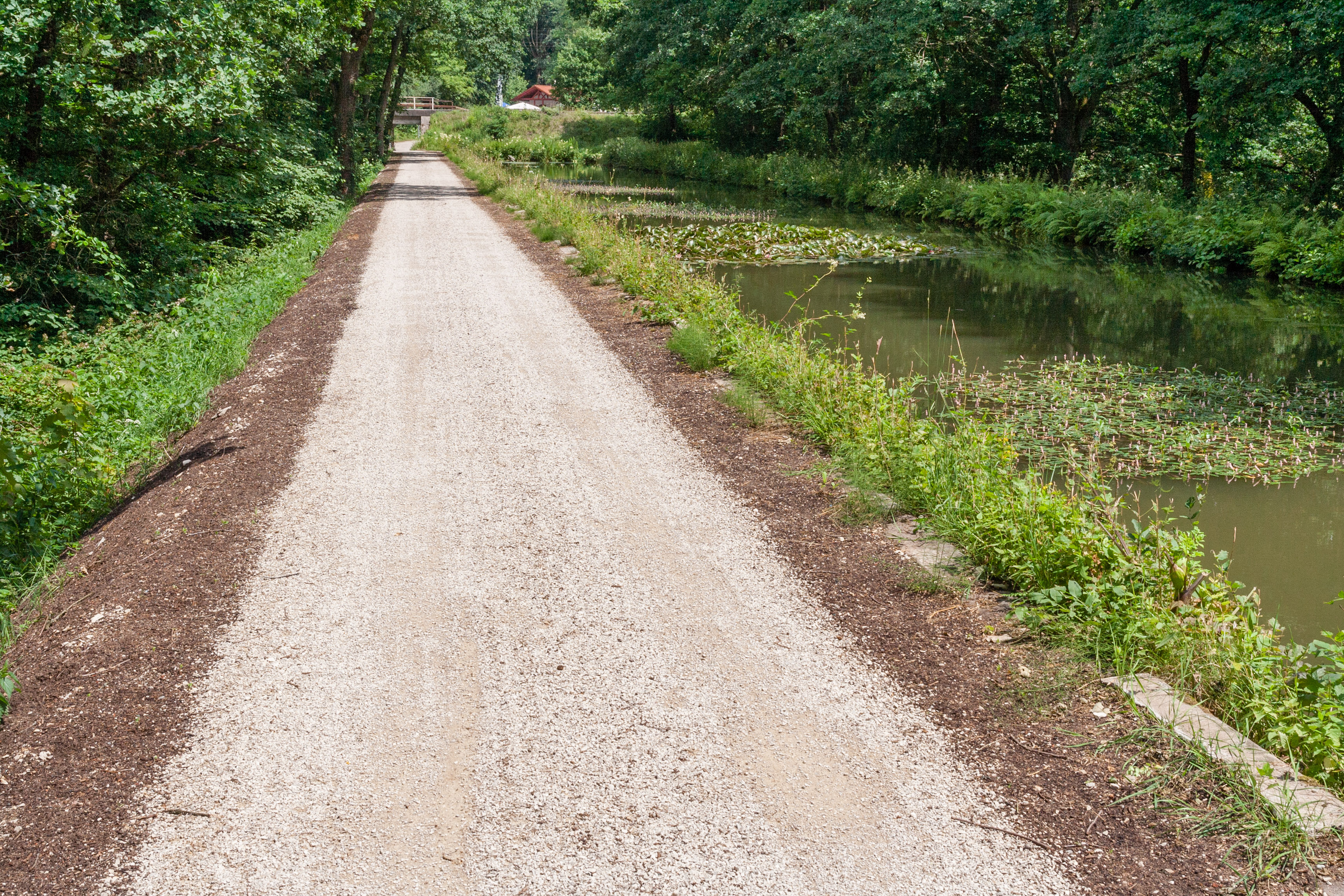 Ludwig-Donau-Main-Kanal, Burgthann, Damm